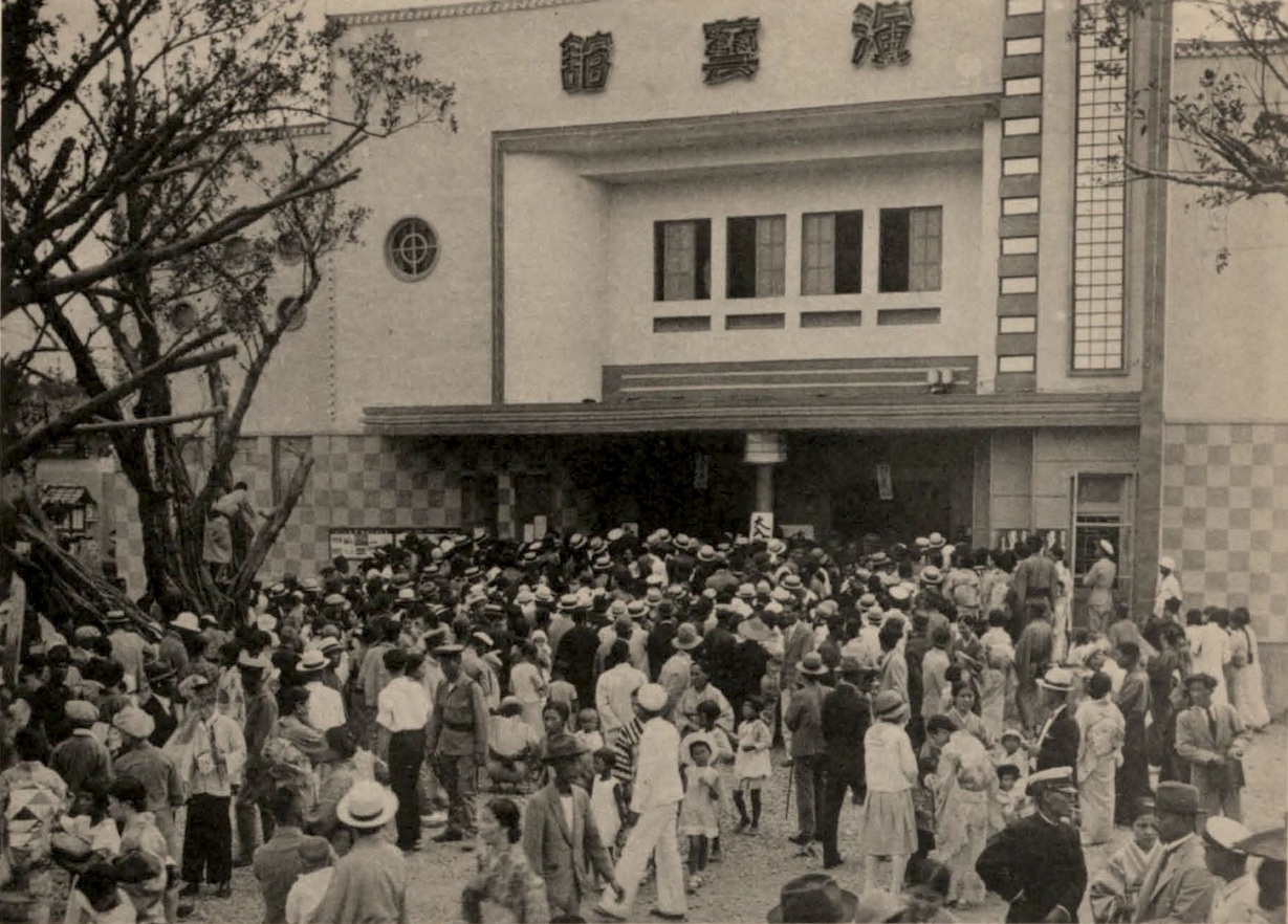 Bân-lâm-gú: 演藝館 (始政四十周年記念臺灣博覽會)